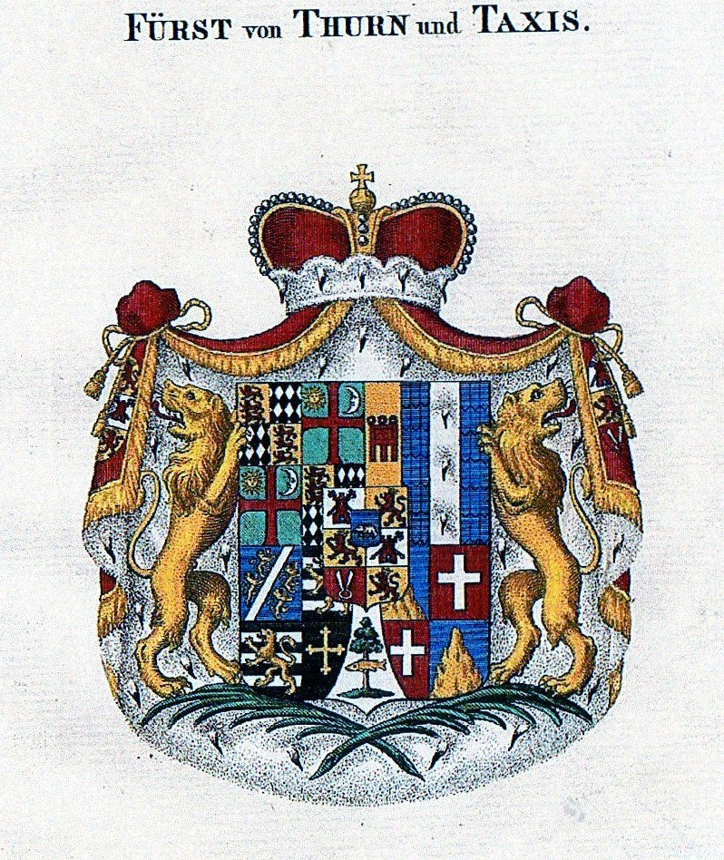 lo stemma dei Principi Thurn und Taxis